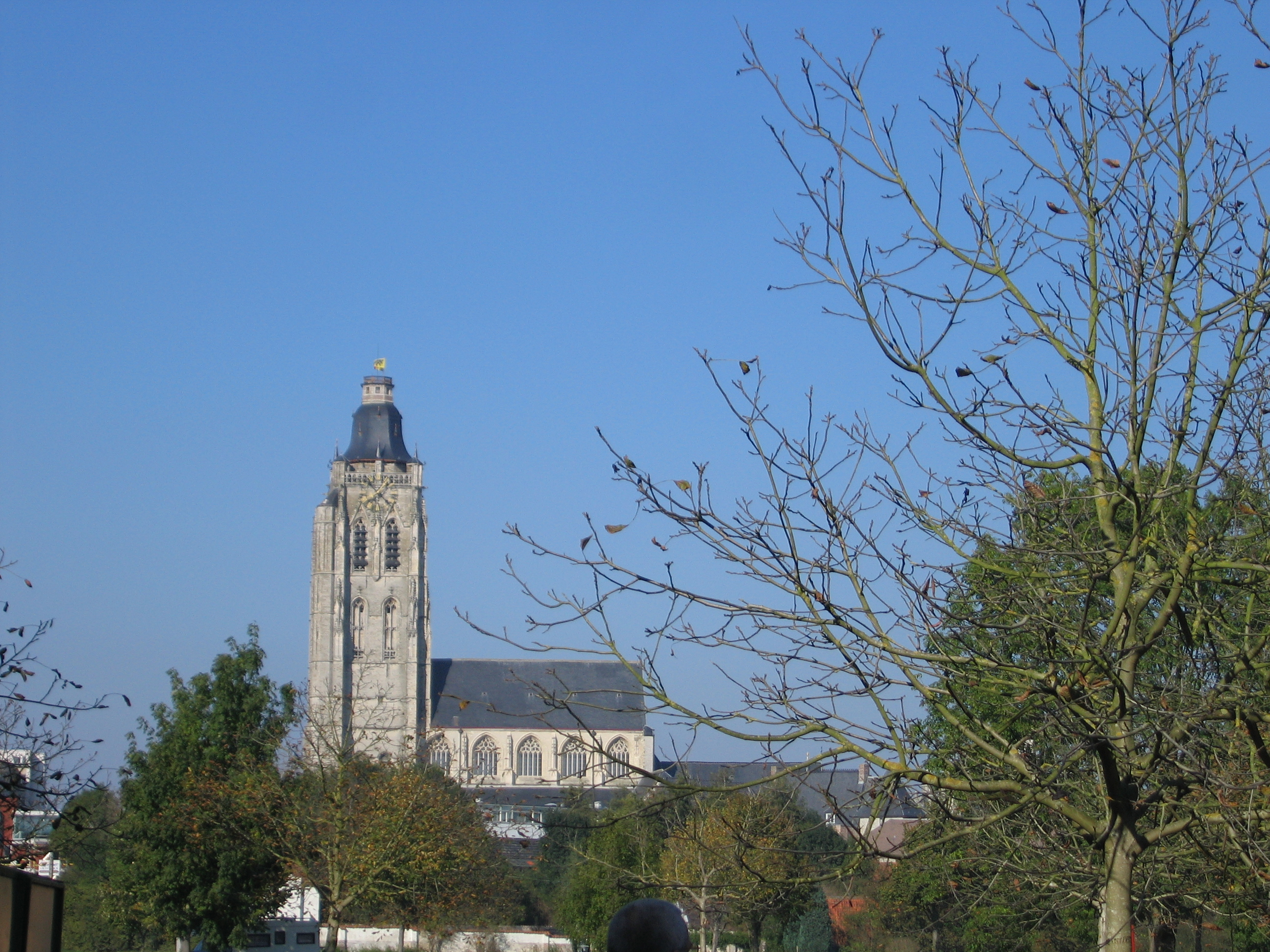 Eigen foto 2005-10-16